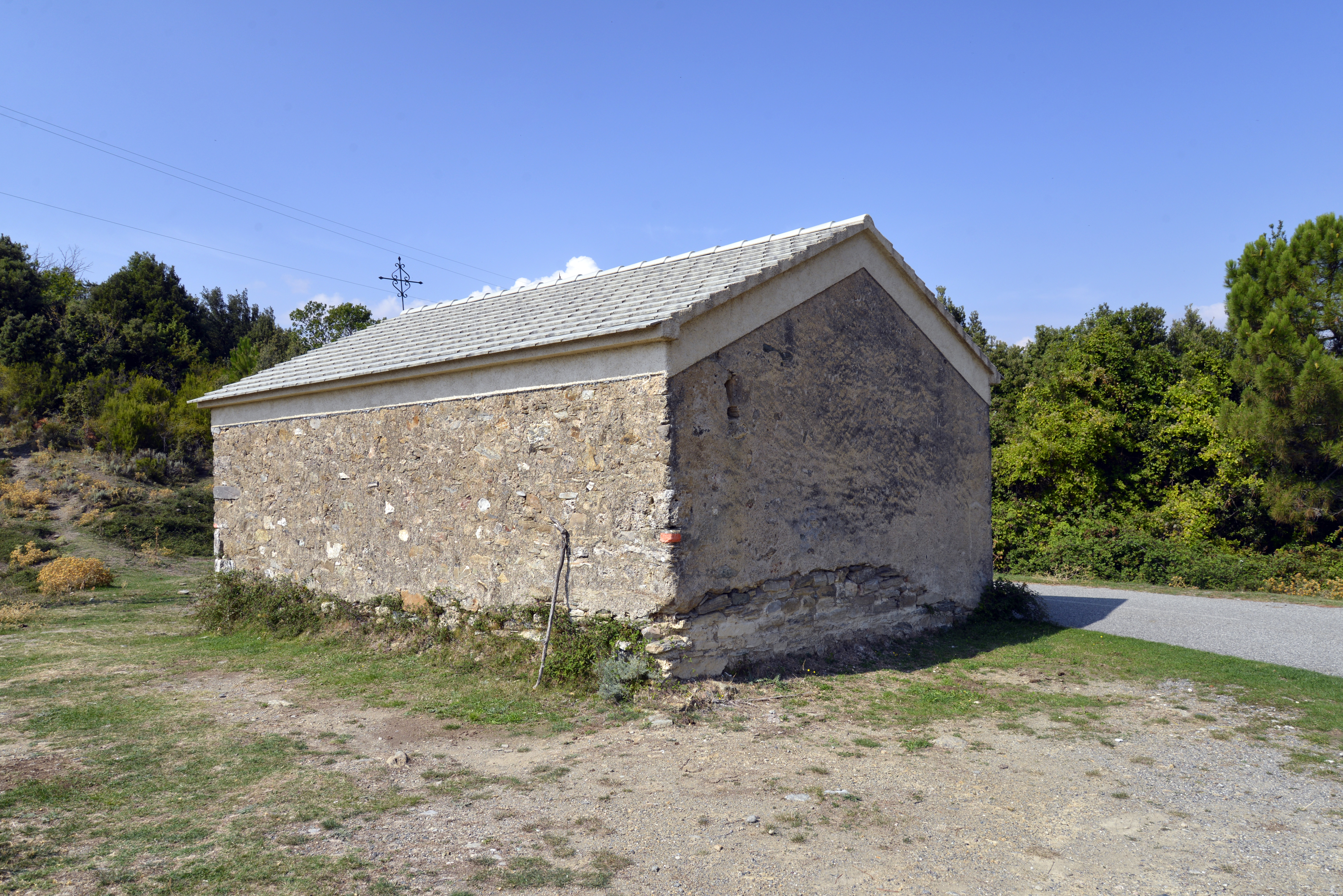 Castellare-di-Mercurio, Bozio (Haute-Corse) - La chapelle romane San Martinu, située à 904 m d'altitude au col entre Sainte-Lucie et Castellare, en bordure de la route D41, remaniée au cours des siècles, présente aujourd'hui un chevet plat, l'abside semi-circulaire ayant été démolie.